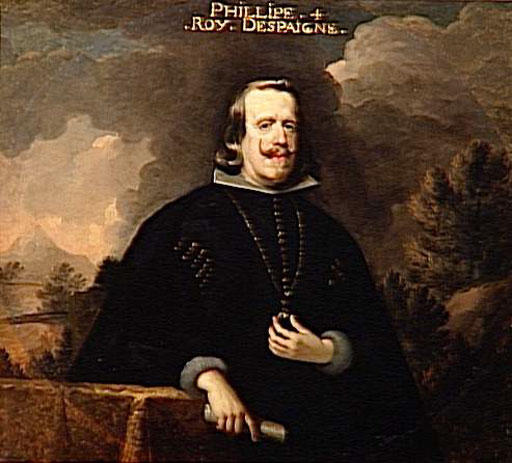 taller de Velázquez: Felip IV. Palau de Versalles.